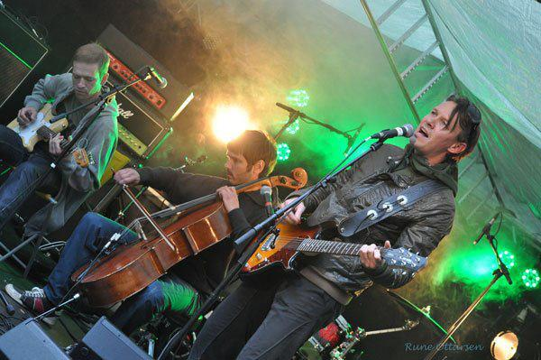 Lonely Crowd live på Finnsnes.